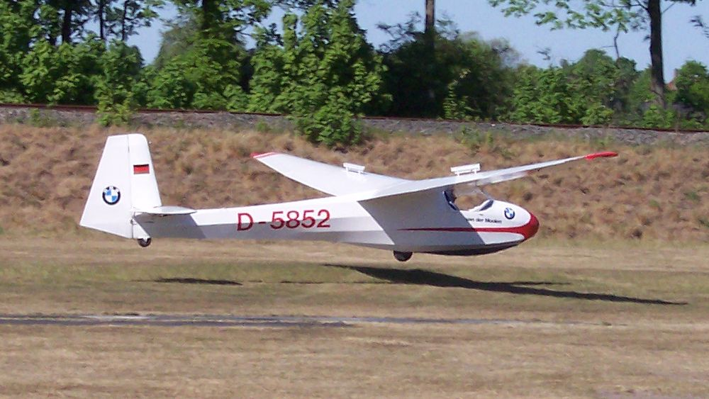 Schleicher K 8b D-5852